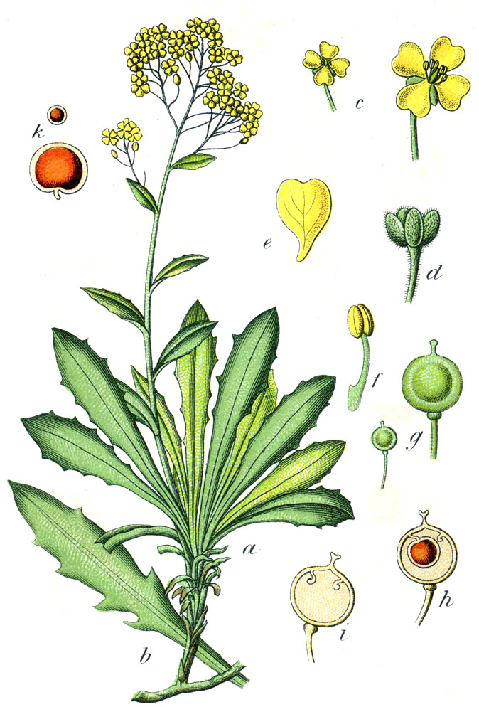 Aurinia saxatilis subsp. saxatilis, syn. Alyssum saxatile L., Crucifera saxatilis (L.) E.H.L.Krause Original Caption Felsen-Schildkraut, Crucifera saxatilis